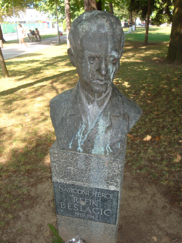 Рефик_Бешлагић